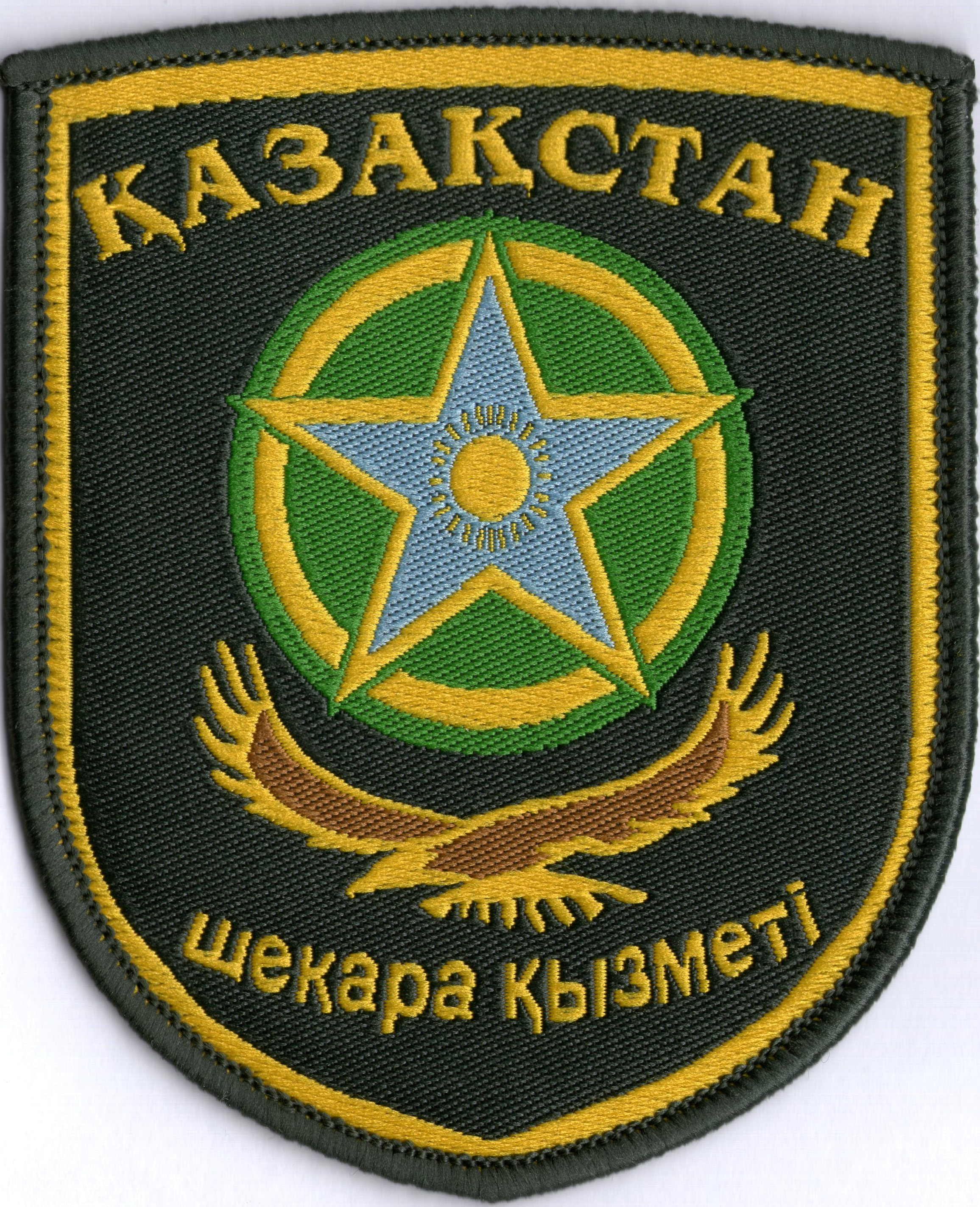 Нарукавный знак Пограничной Службы КНБ Республики Казахстан